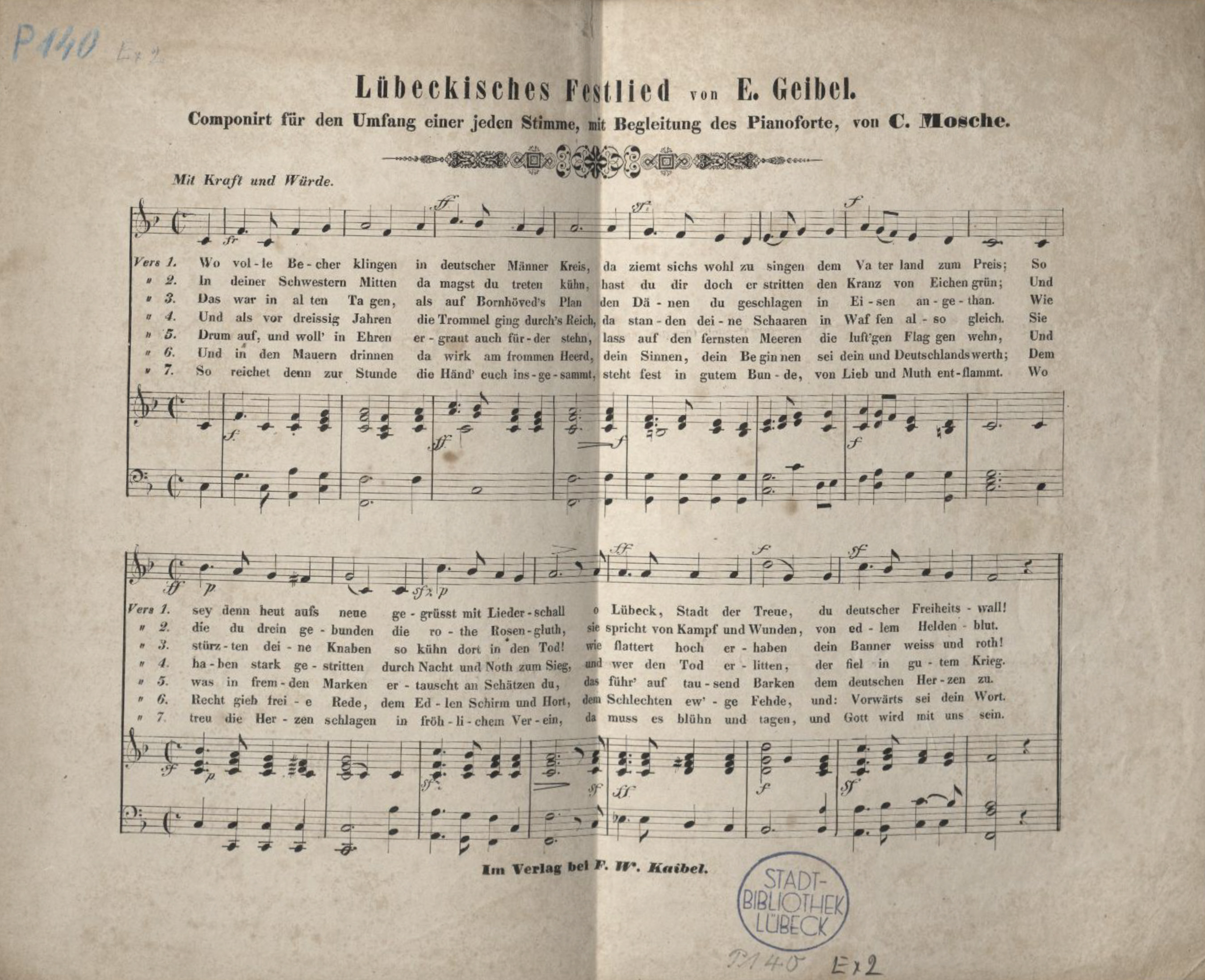 Das Lübeckische Festlied, später als Lübeckische Nationallied bekannt